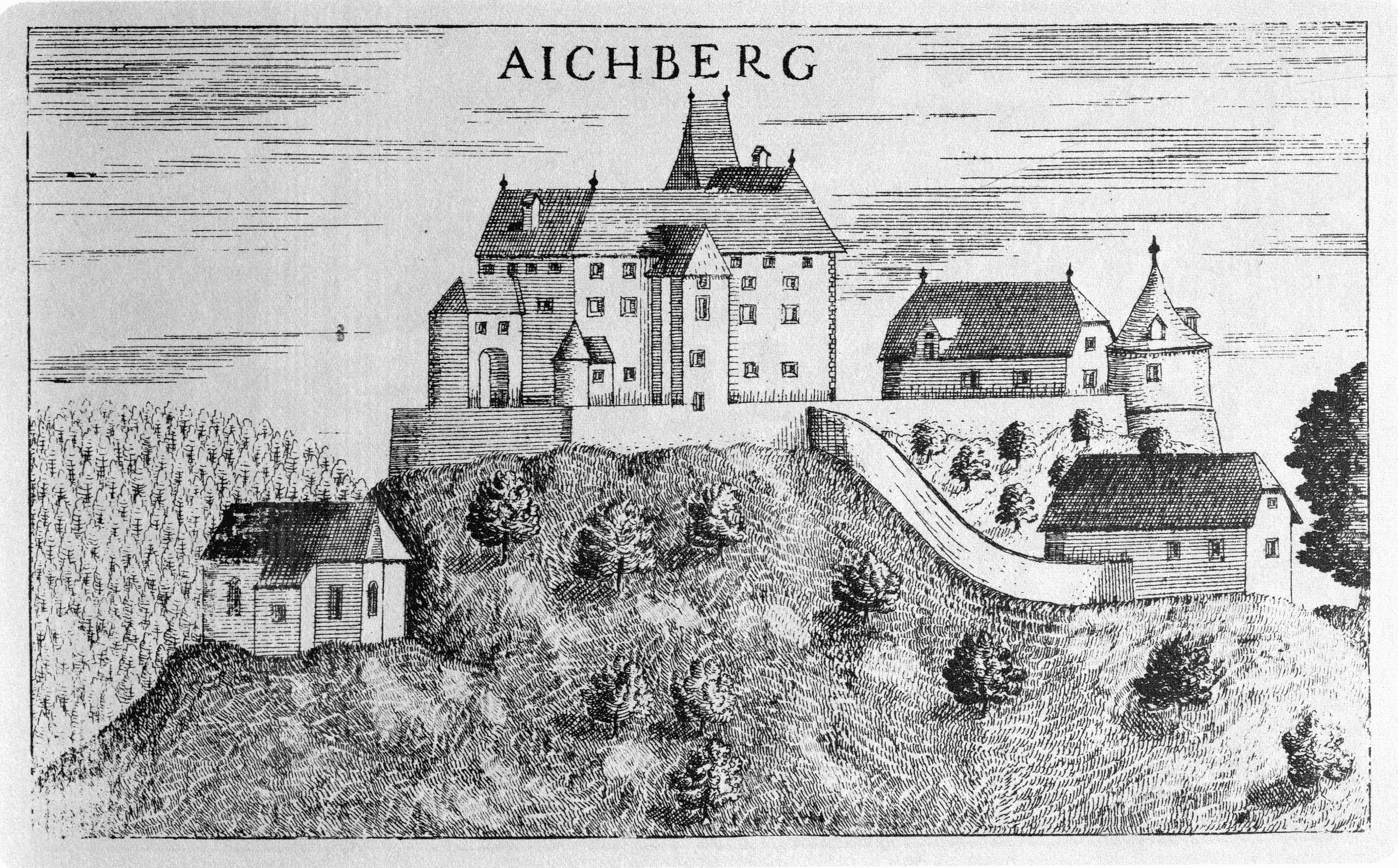 G. M. Vischers Käyserlichen Geographi, Topographia Ducatus Stiriae, Das ist: Eigentliche Delineation / und Abbildung aller Städte / Schlösser / Marcktfleck / Lustgärten / Probsteyen / Stiffter / Clöster und Kirchen / so es sich im Herzogthumb Steyrmarck befinden; Und anjetzo Umb einen billichen Preyß zu finden seynd Bey Johann Bitsch Universitäts Buchhandlern / Auff dem Juden=Platz bey der guldenen Saulen. Graz 1681 Die Nummerierung der Dateien folgt der alphabetischen Reihung der Orte